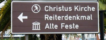 Typisches Beispiel deutscher Bezeichnungen und Strassenschilder in Namibia. Hier in Windhoek verweisend auf die Christuskirche, die Alte Feste und den Südwester Reiter.